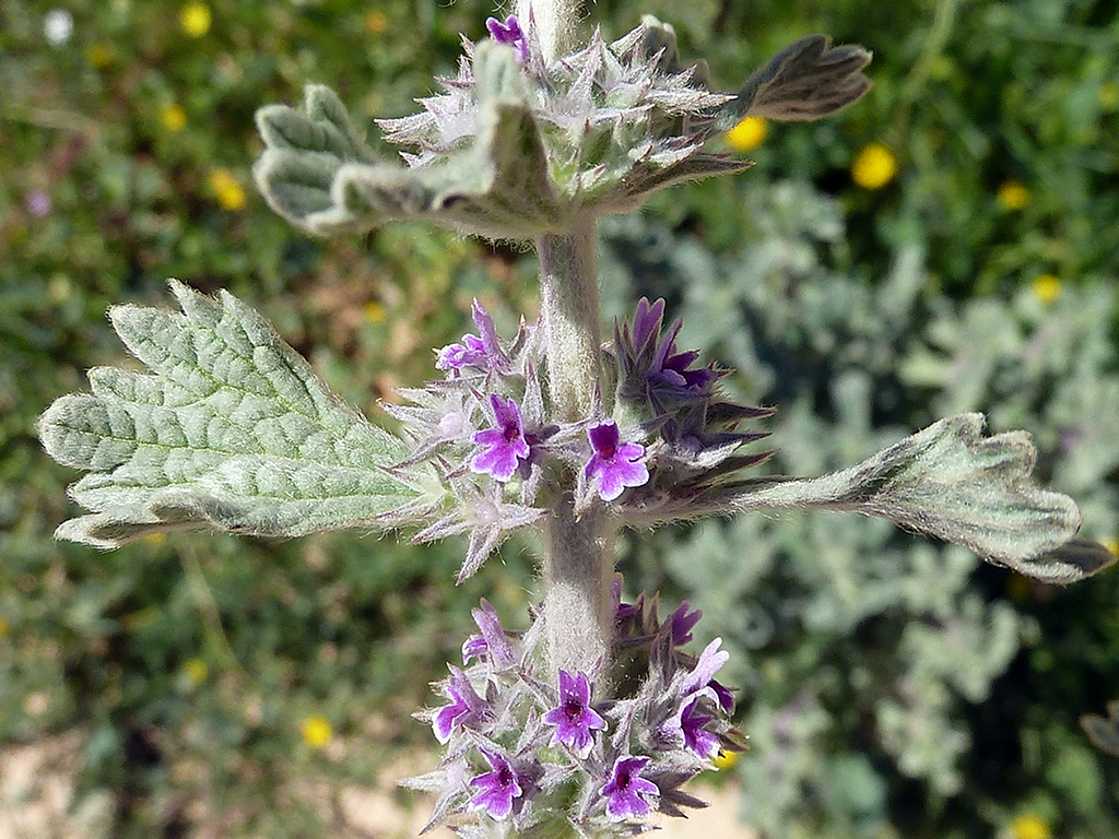 Marrubium alysson (Hierba de la rabia) : Verticilastros en flor y hojas - Colonia Illicitana, Albatera (Alicante, España).